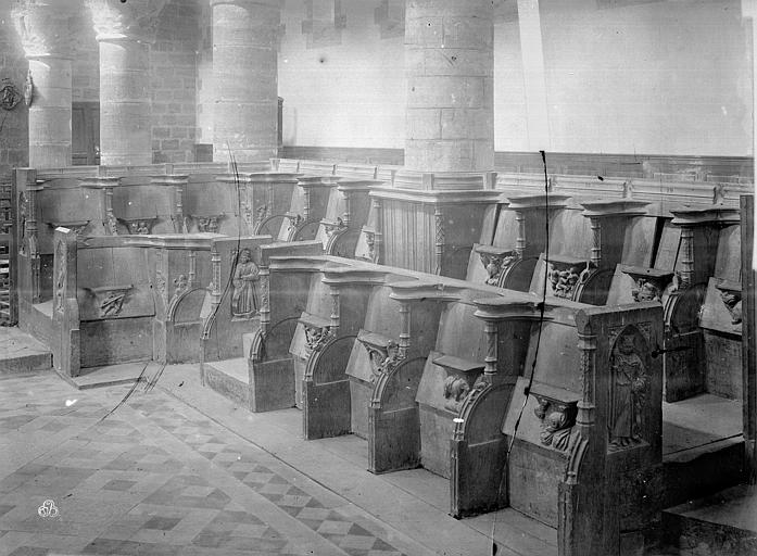 Stalles